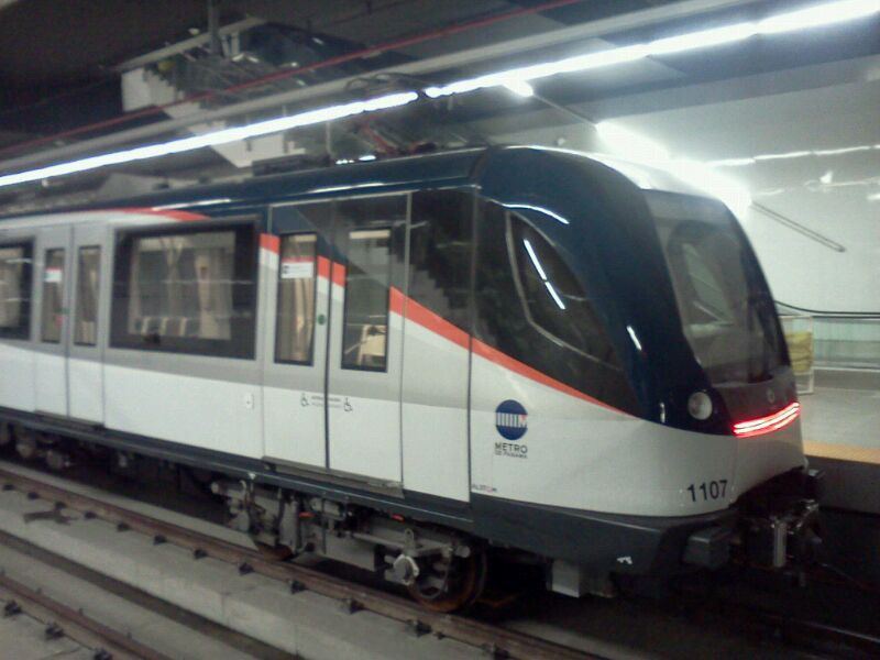 Una de las automotores del Metro de Panamá.